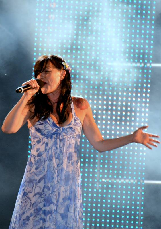 Lio au concert "La Folie des années 80" à Enghien-les-Bains